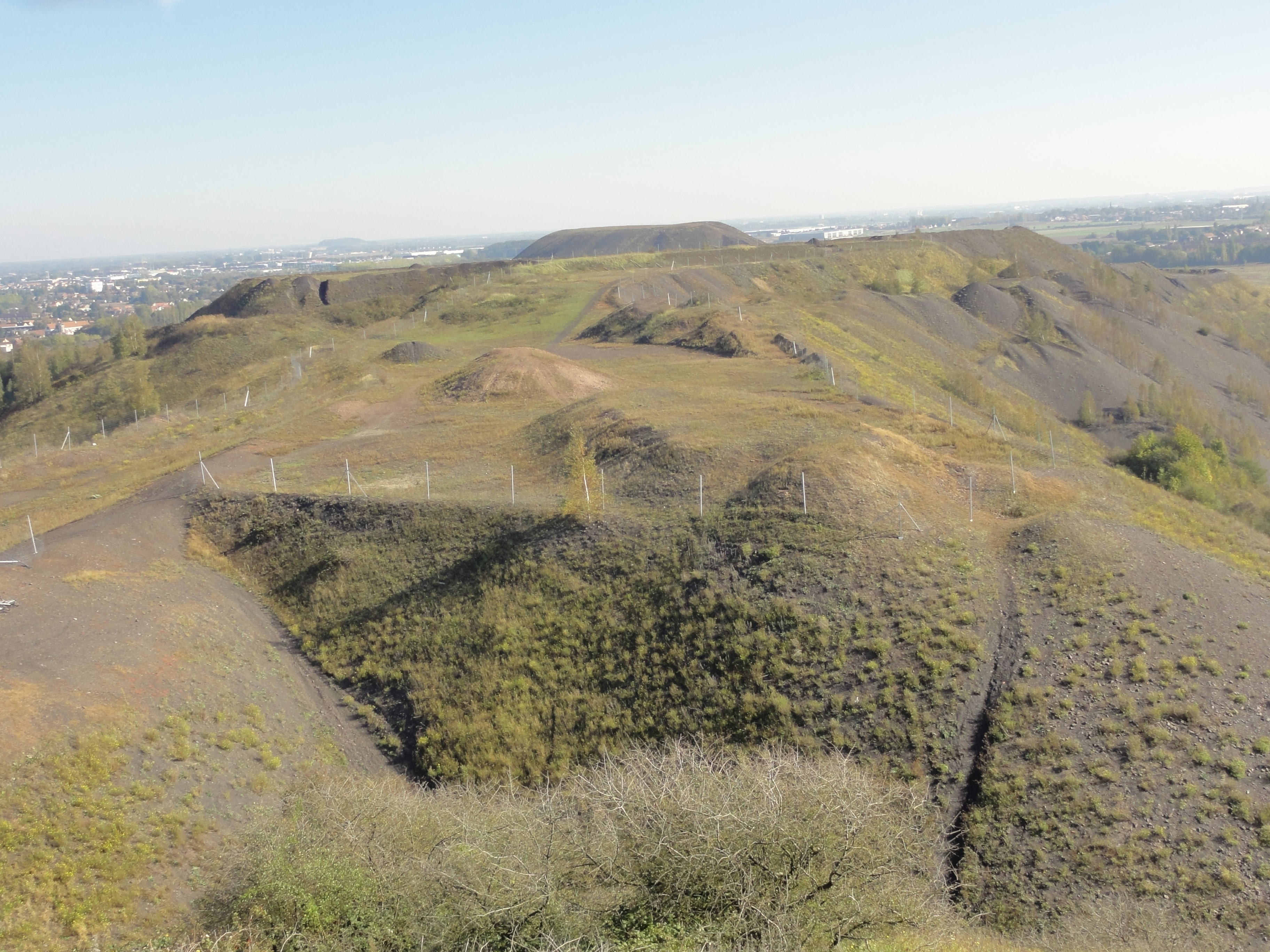 Terril n° 101 dit Lavoir de Drocourt, Lavoir de Drocourt du Groupe d'Hénin-Liétard dans le bassin minier du Nord-Pas-de-Calais, Hénin-Beaumont, Pas-de-Calais, Nord-Pas-de-Calais, France. Le terril no 101 est inscrit sur la liste du patrimoine mondial de l'Unesco le 30 juin 2012 et y constitue en partie le site no 48.